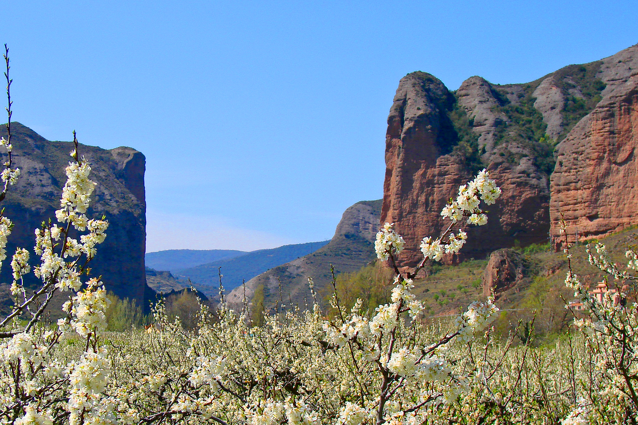 Puerta del Camero Nuevo, La Rioja - España